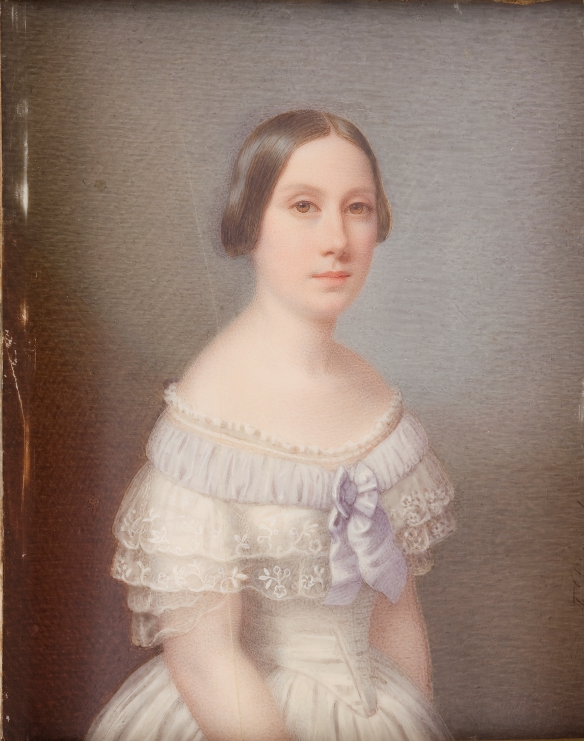 María Carolina de Borbón - Dos Sicilias, condesa de Montemolín.